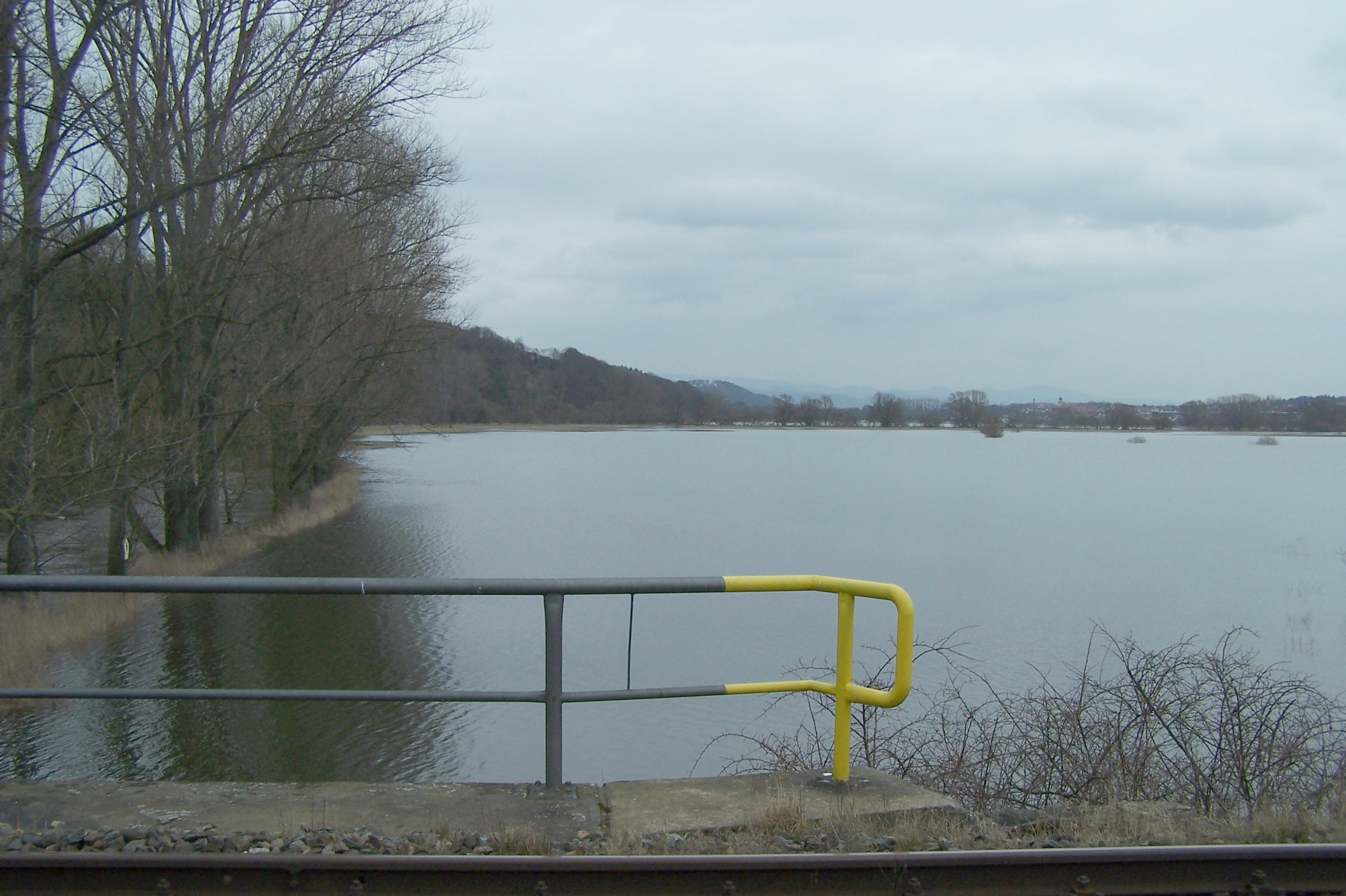 Am Brückenkopf auf Leimbacher Seite, das Geländer markiert den Beginn der eigentlichen Brücke. Im Hintergrund die zeitweise überflutete Werraaue unterhalb von Bad Salzungen.